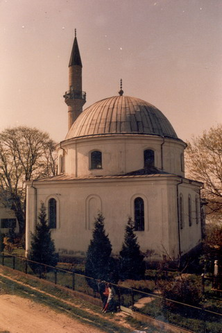 Azizija dzamija u Brezovo Polje